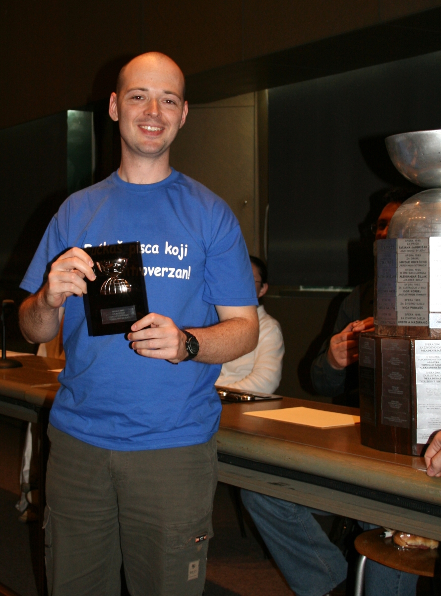 SFeraKon, Zagreb